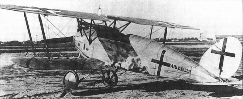 Drugi prototyp niemieckiego samolotu myśliwskiego Albatros D.XII o numerze 2211/18.